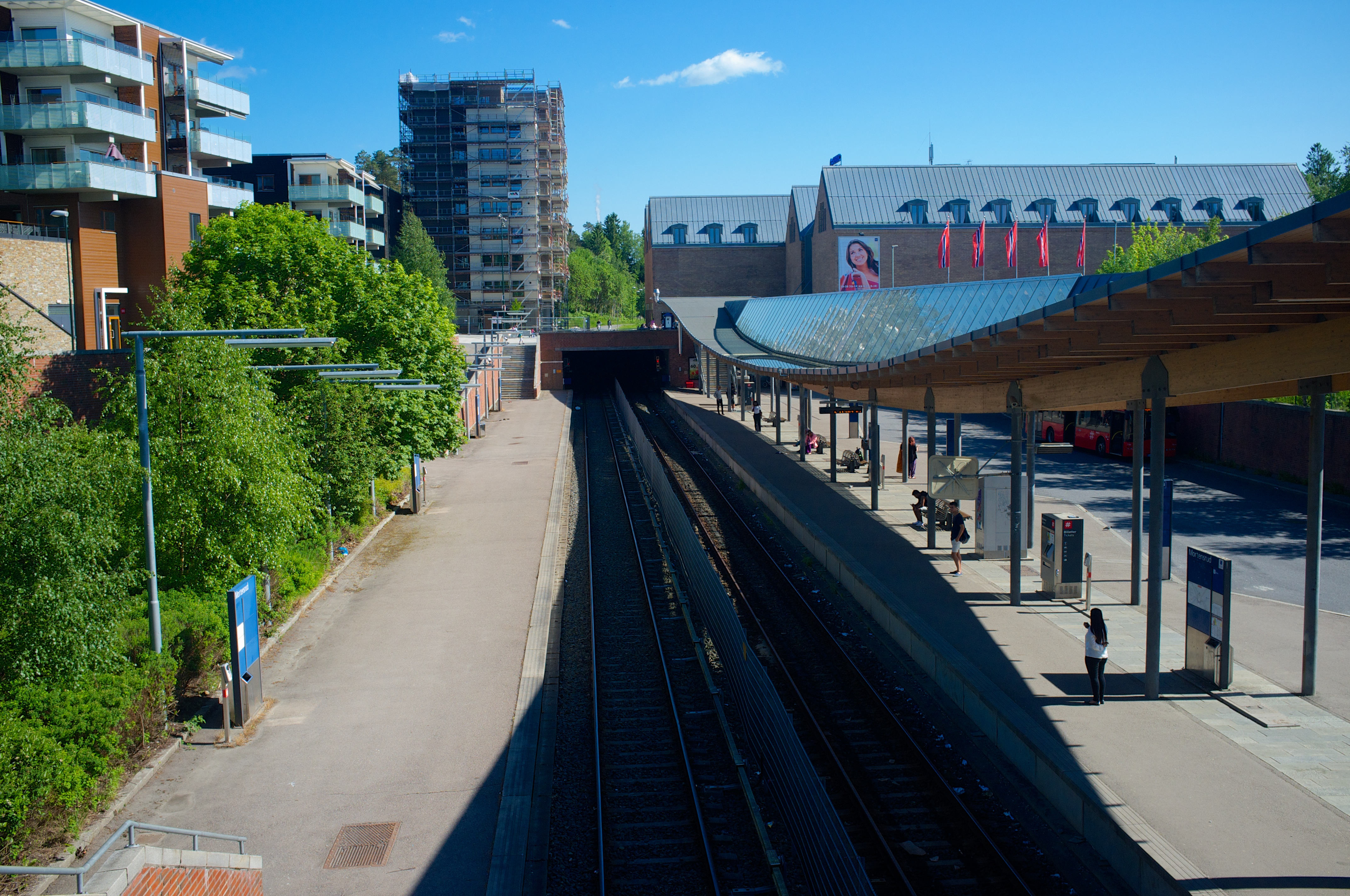 Mortensrud stasjon